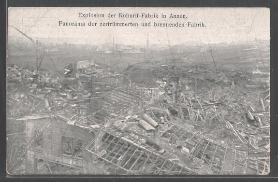 Explosionsfolgen in der Roburit-Fabrik in Witten-Annen